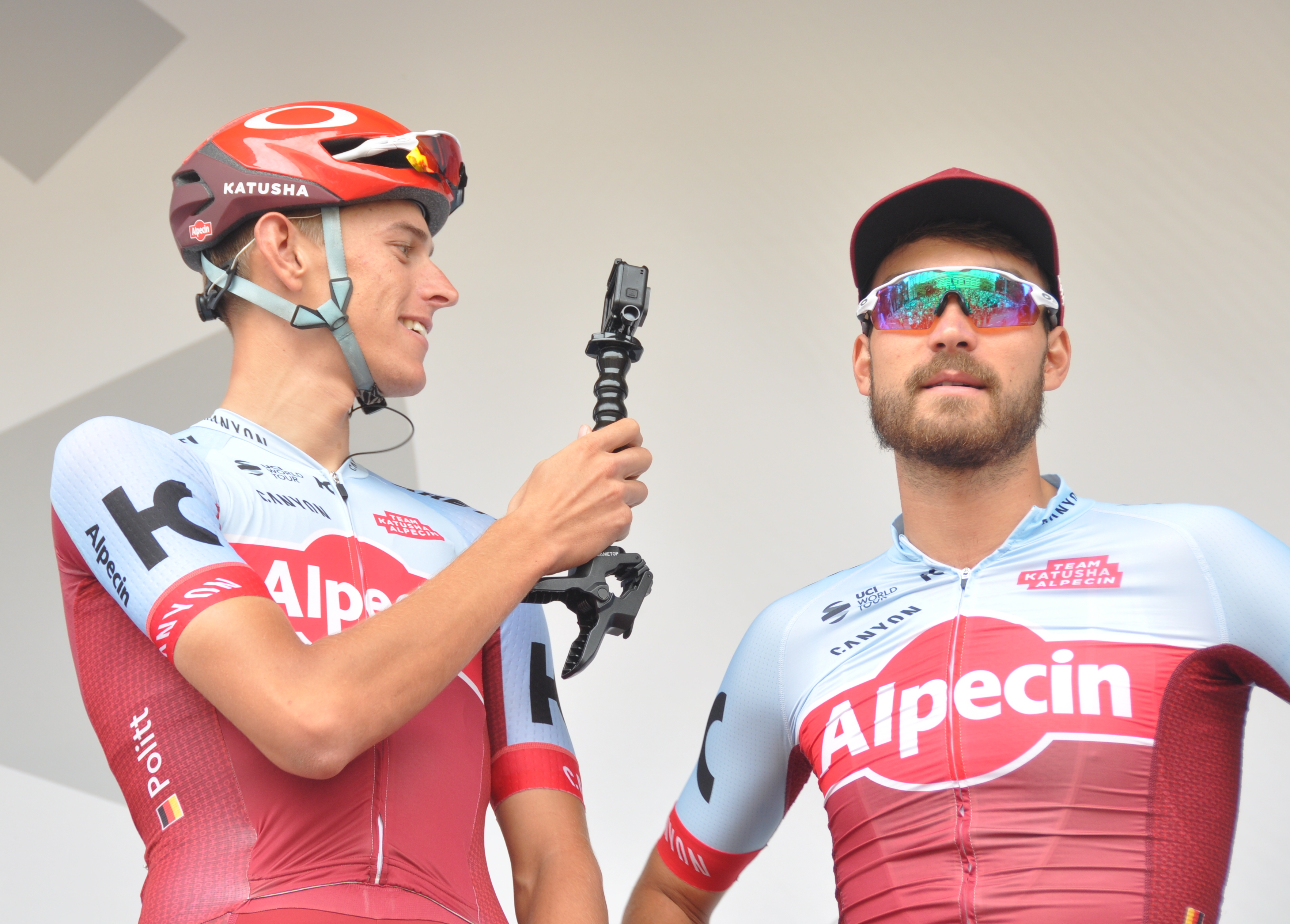 "Kamerakind" Nils Politt (l.) und Rick Zabel, deutsche Radrennfahrer